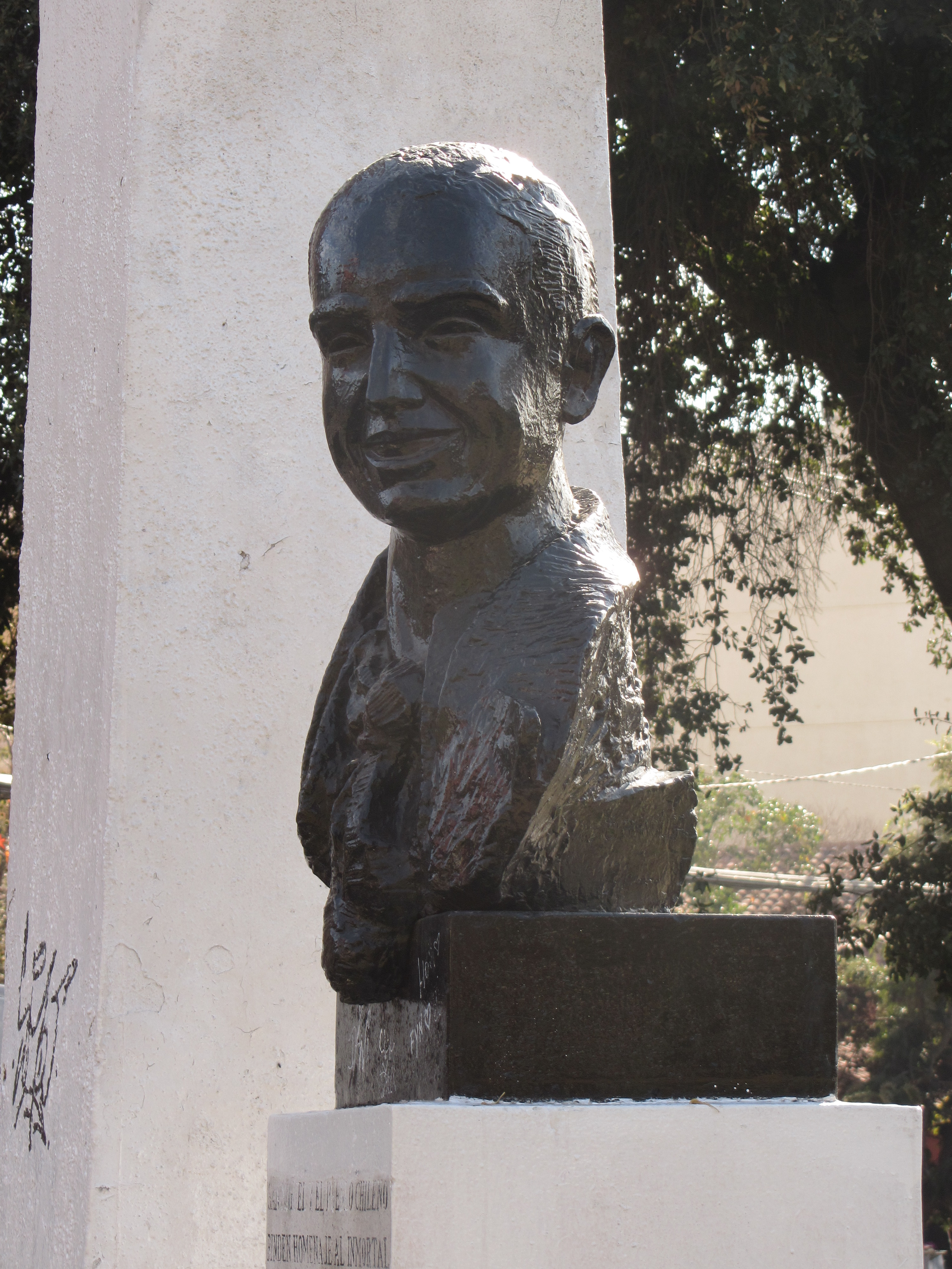 Busto al cantante argentino Carlos Gardel en el Parque El Llano de San Miguel, Chile